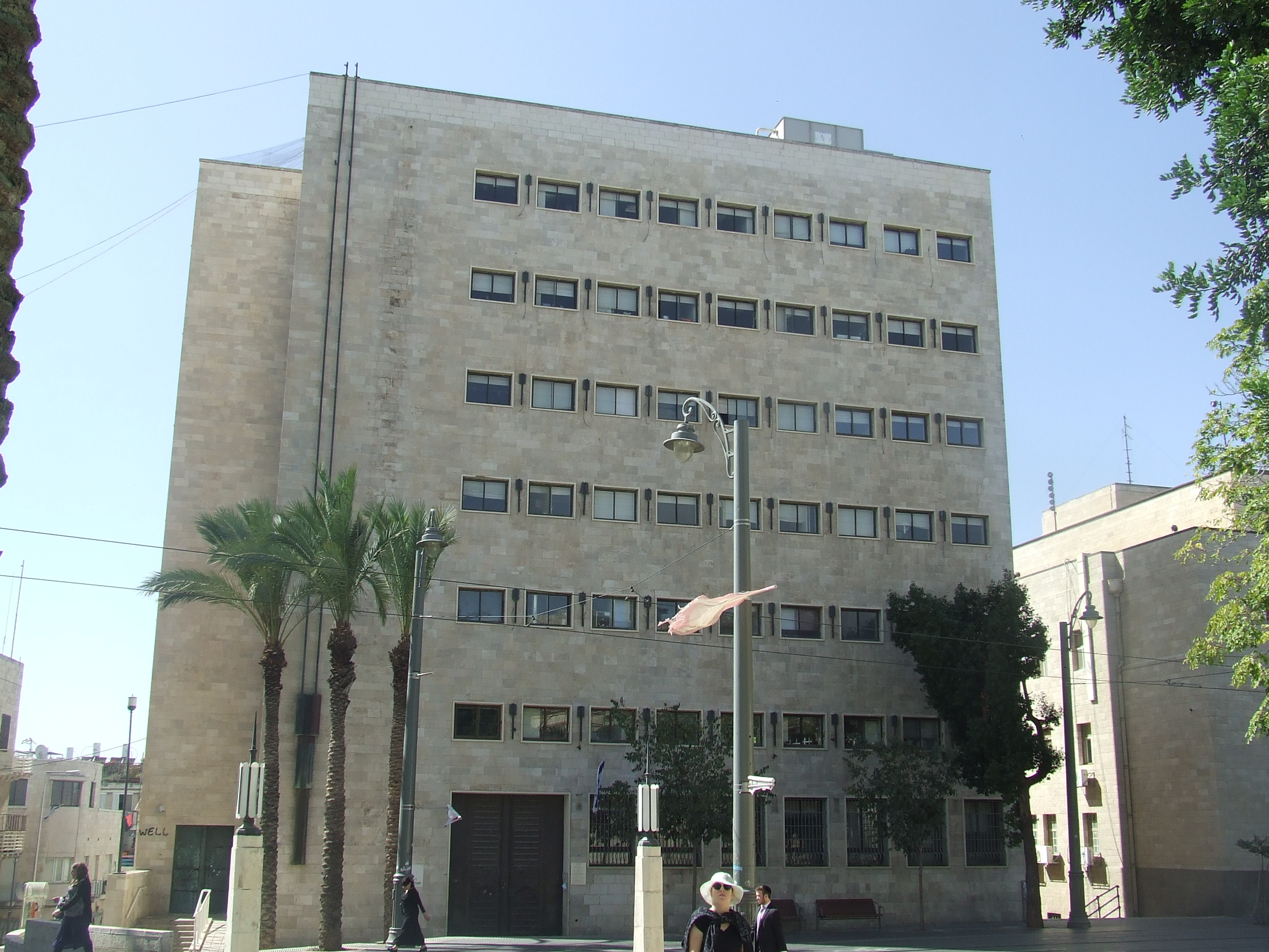 בניין בנק לאומי (במקור בניין בנק אנגלו פלשתינה) הוא מבנה ברחוב יפו שבירושלים, מול כיכר ספרא ובניין עיריית ירושלים. נבנה על ידי השלטון הבריטי כאחד מארבעה מבנים לאורך ראשית רחוב יפו, עבור בנק אנגלו פלשתינה (לימים בנק לאומי). המבנה בנוי משני גושים בסגנון הבינלאומי, והיה הבניין הראשון שגובהו 7 קומות שנבנה בעיר.